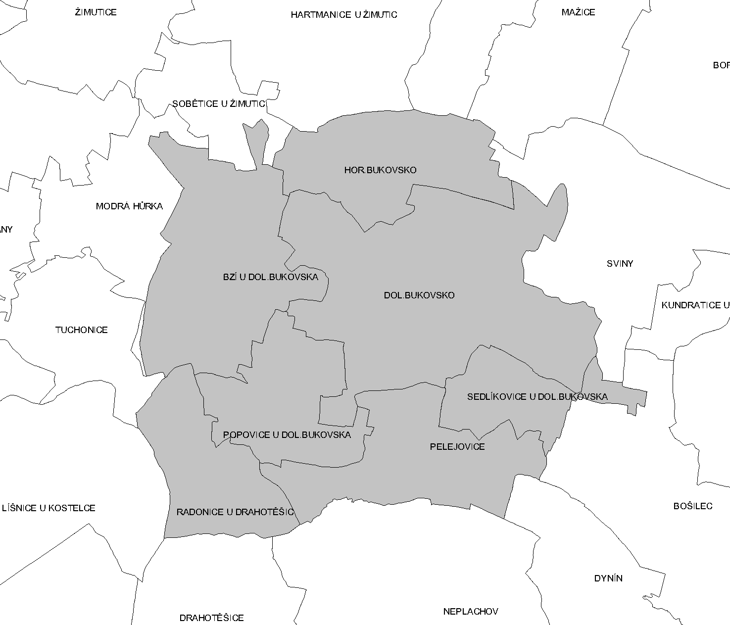 Katastrální členění Dolního Bukovska